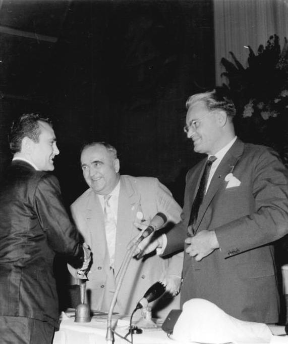 Zentralbild Krüger Nl-Qu 25.6.1960 Berlin: Funktionäre der CDU beraten die nächsten Aufgaben. UBz. Herr Corrao, früherer Minister der Regionalregierung Siziliens und Abgeordneter der Christlich-Sozialen Volkspartei (links), übermittelt August Bach, Vorsitzender der CDU (Mitte), und Gerald Götting, Generalsekretär der CDU, Grüße.